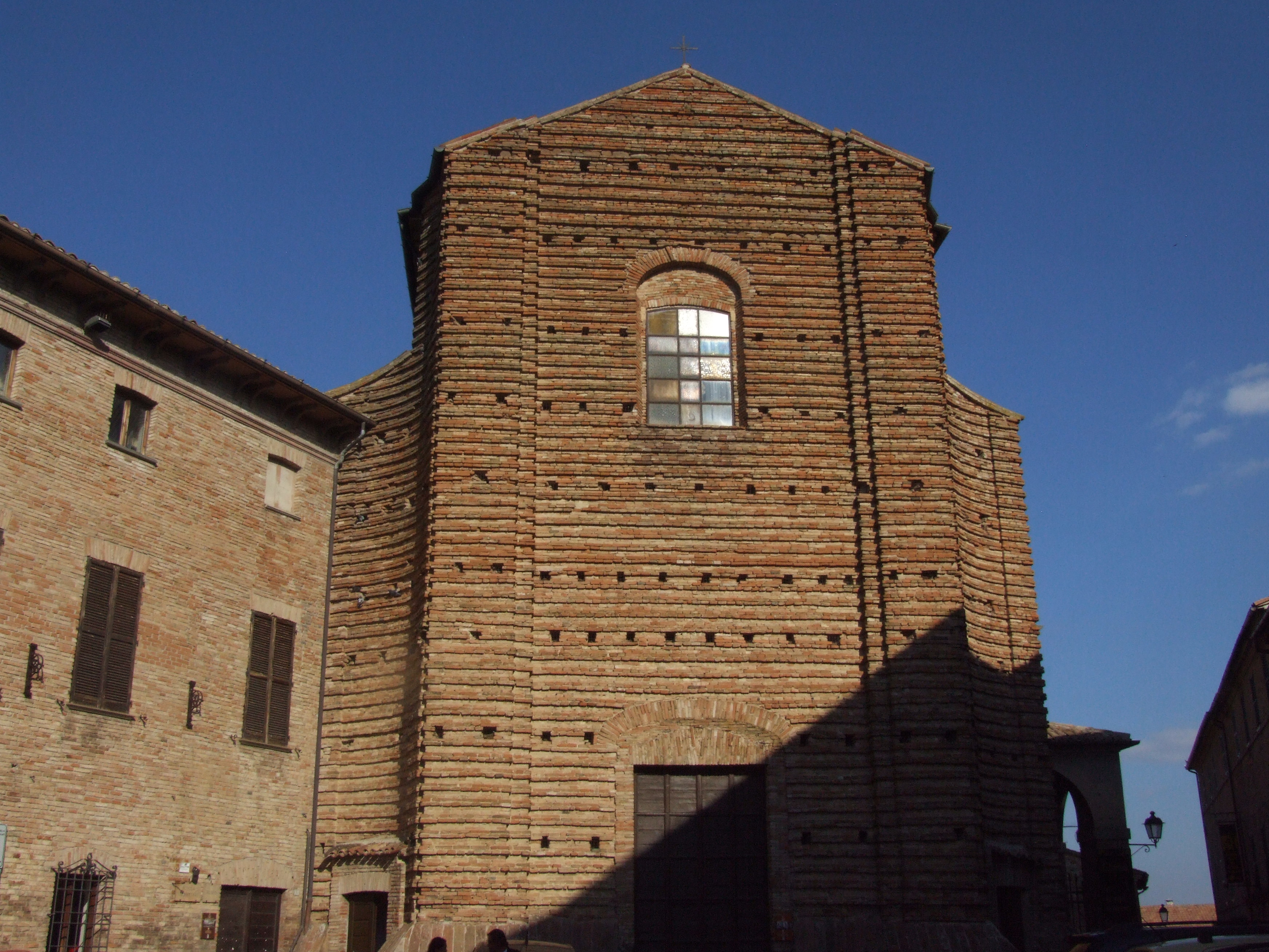 facciata della Chiesa di San Francesco a Mondavio This is a photo of a monument which is part of cultural heritage of Italy.